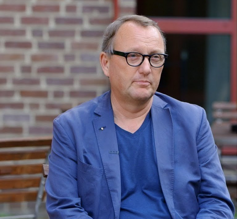 Nicht mehr plump Fachwissen eintrichtern, sondern jungen Menschen das Rüstzeug an die Hand geben, sich selbst ständig weiter zu bilden: So sieht der Autor ...